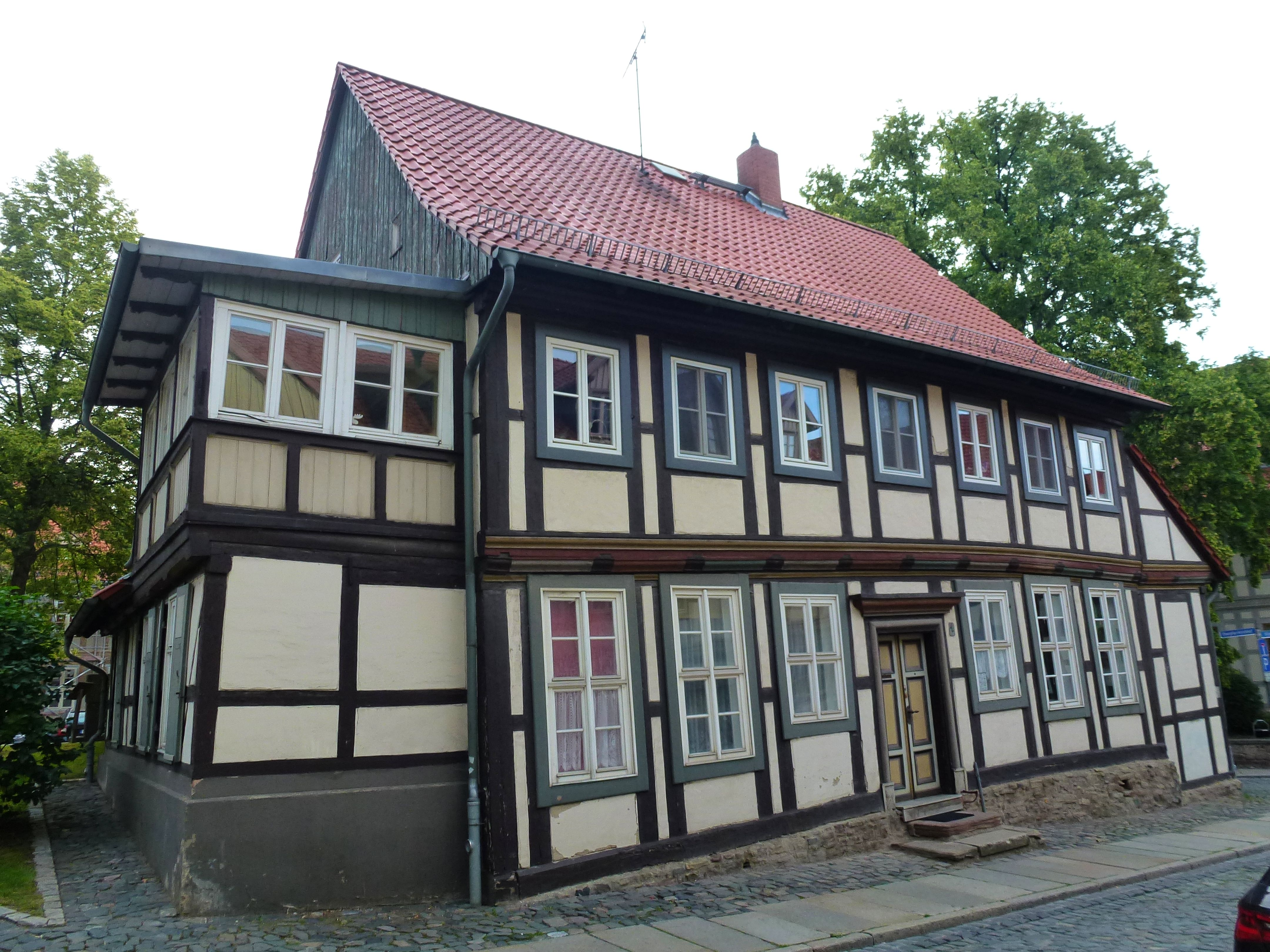 Kösterhaus am Oberpfarrkirchhof 4 in Wernigerode